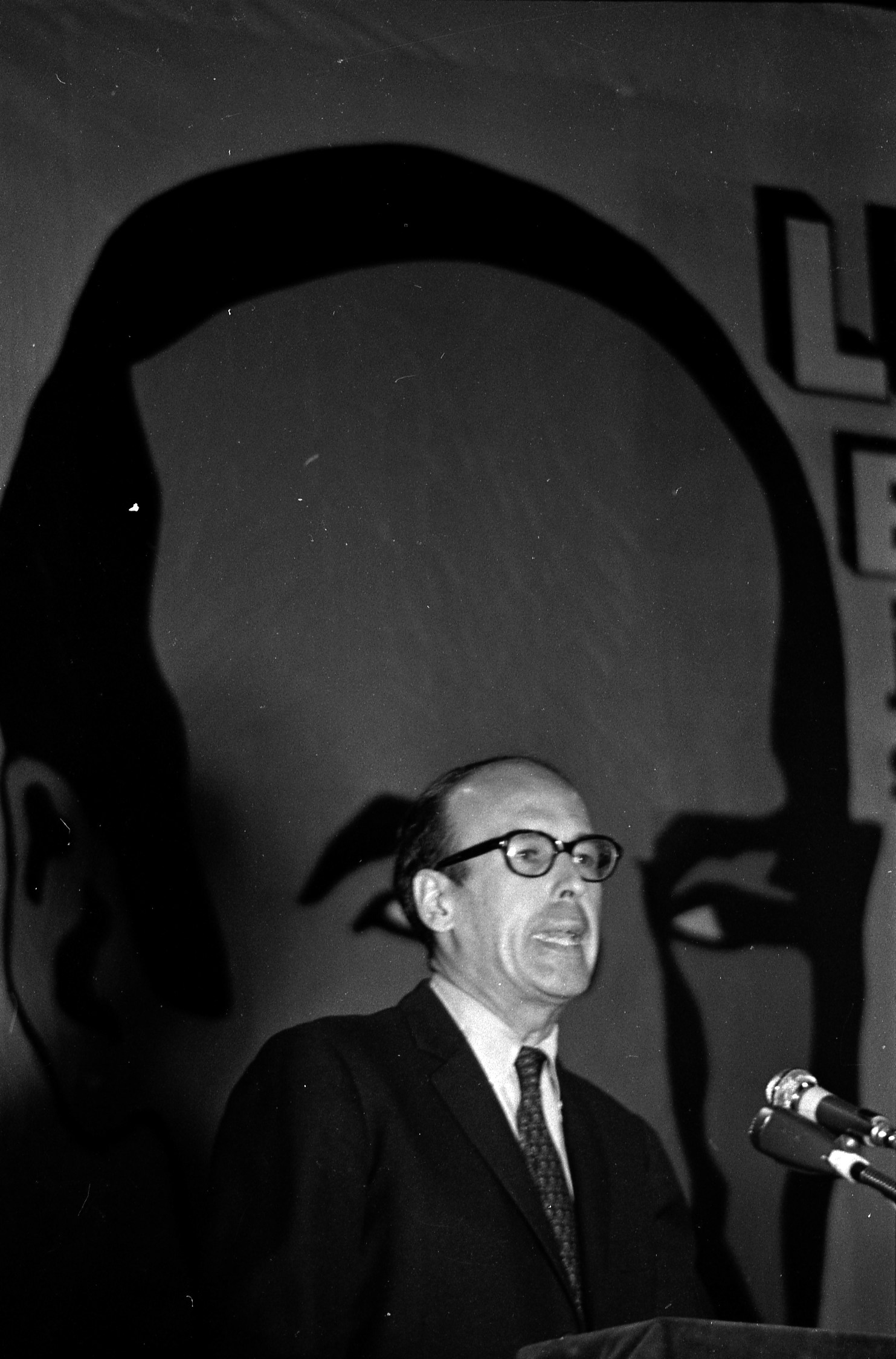 Pas de lieu. Le 20 Mai 1969. Vue de Valéry Giscard d'Estaing lors d'un discours dans une salle toulousaine.